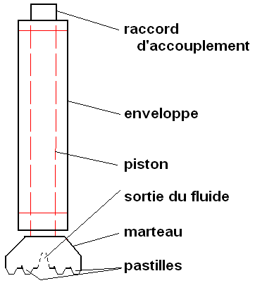 Coupe schematique d'un marteau fond de trou